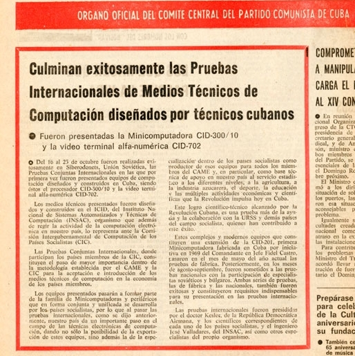 Сообщение о завершении международных испытаний кубинского компьютера